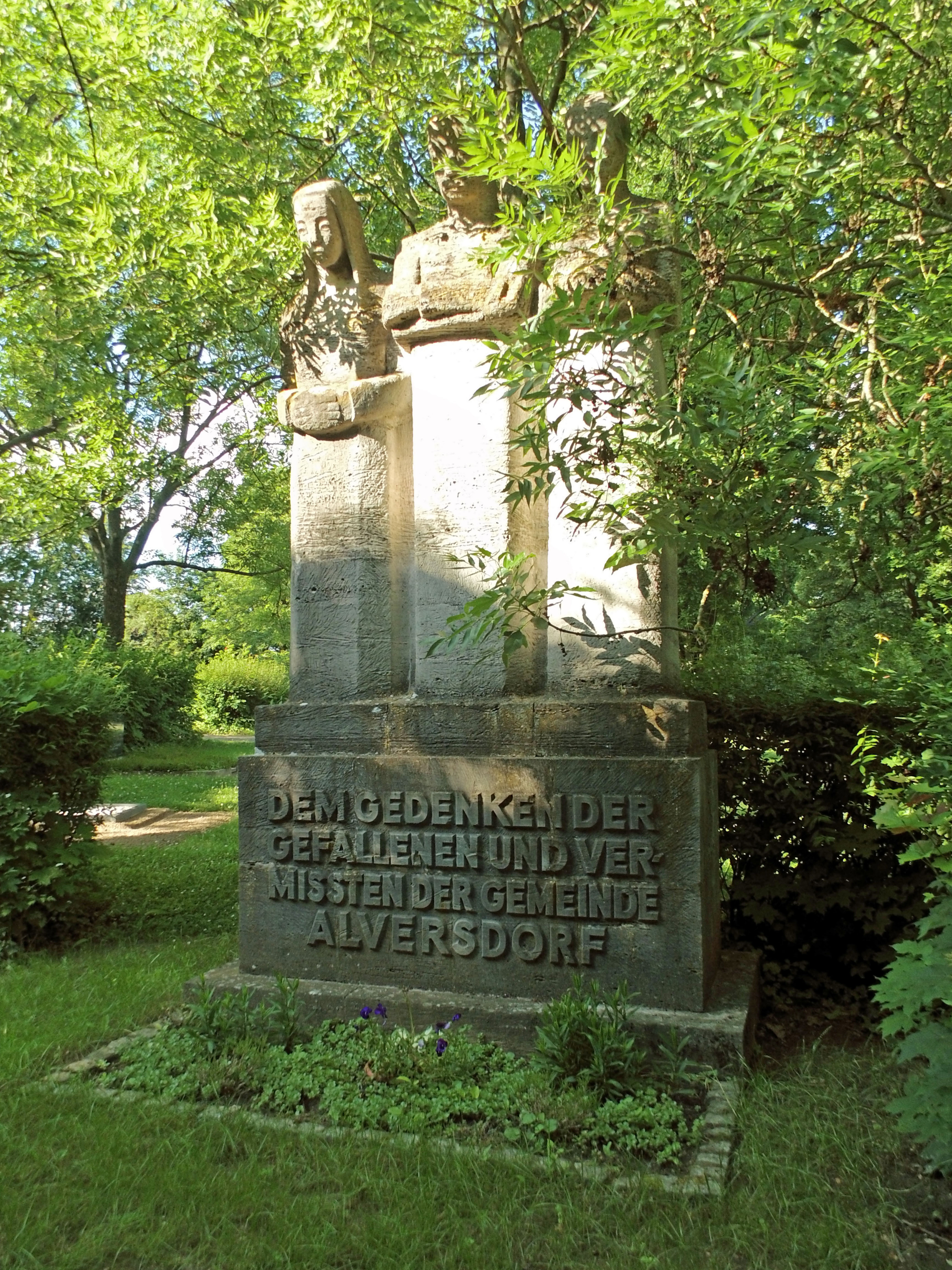 Denkmal für die im zweiten Weltkrieg Gefallenen und Vermißten der Gemeinde Alversdorf, an seinem heutigen Standort auf dem Friedhof von Esbeck (Landkreis Helmstedt)